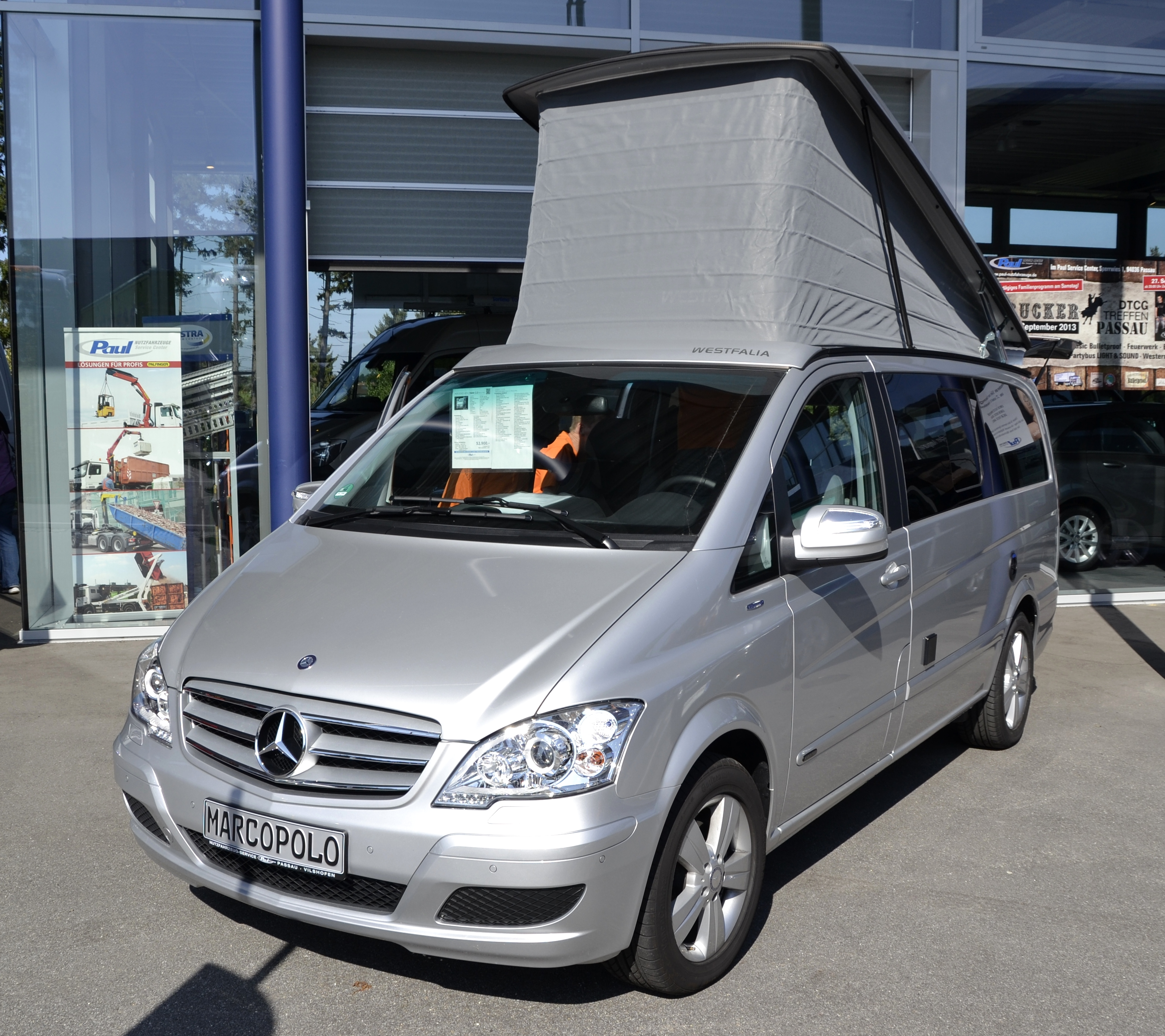 Das Europäisches Trucker-Treffen in Passau im Jahr 2013.